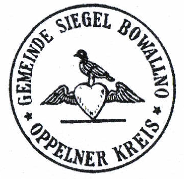 Stara pieczęć gminny Wawelna (Bowallno)